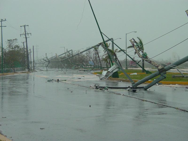 Tendido electrico derribado sobre av Bonampak